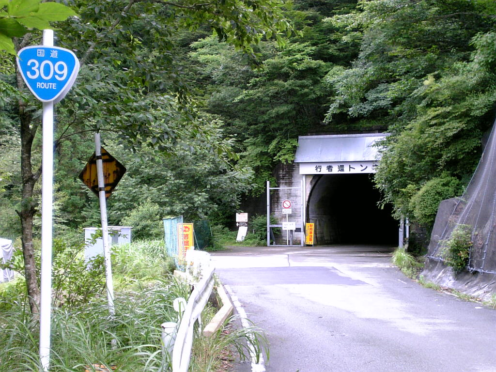 国道309号行者還トンネル東口（奈良県上北山村）